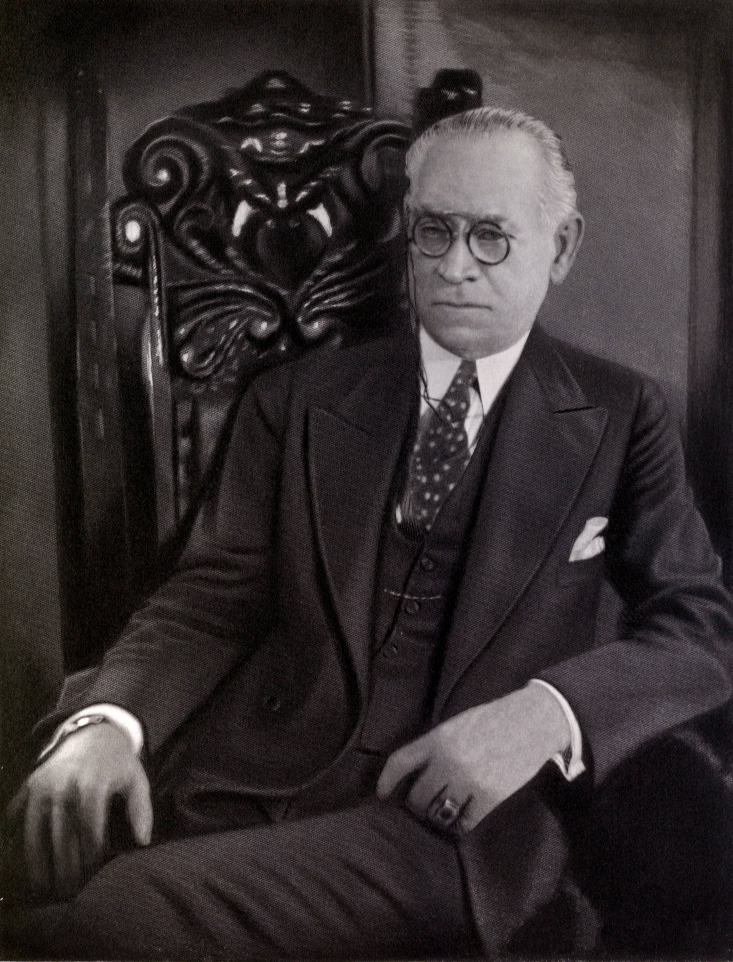 Frank Keenan (8 April 1858 - 24 February 1929)